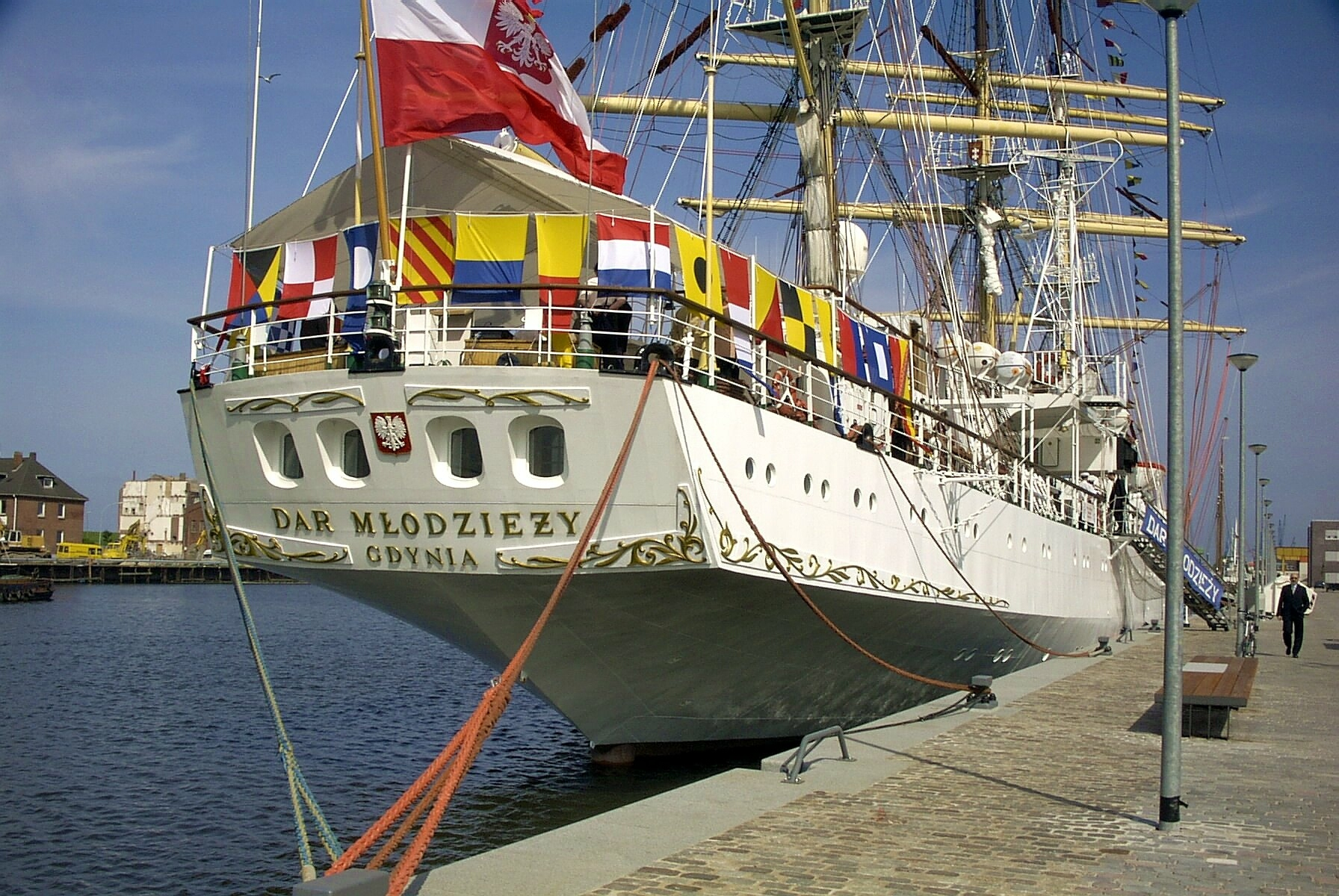 Dar Mlodziezy achtern